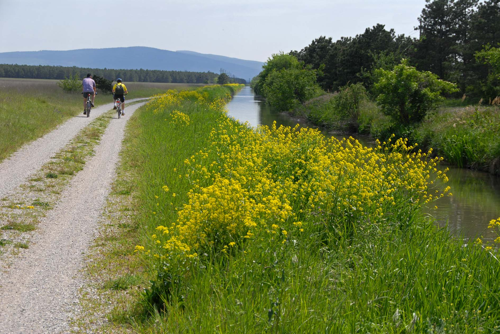 Wiener Neustaedter Canal in may